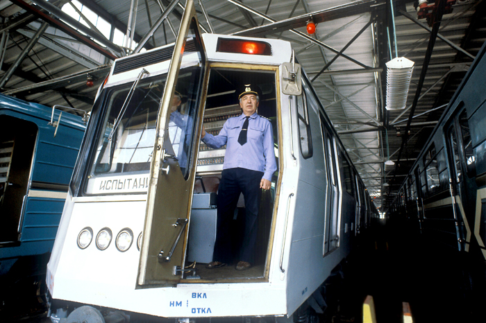 Вагон типа И с открытой передней дверью в ТЧ-4 Красная Пресня